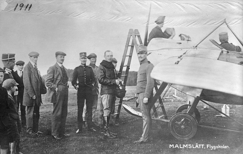 Flygplan M 2 med personer omkring på flygskolan på Malmslätt. Sidovy. Carl Cederström i rutig tröja vänd mot kameran, därefter Emil Björnberg, Gösta von Porat samt Allan Jungner.